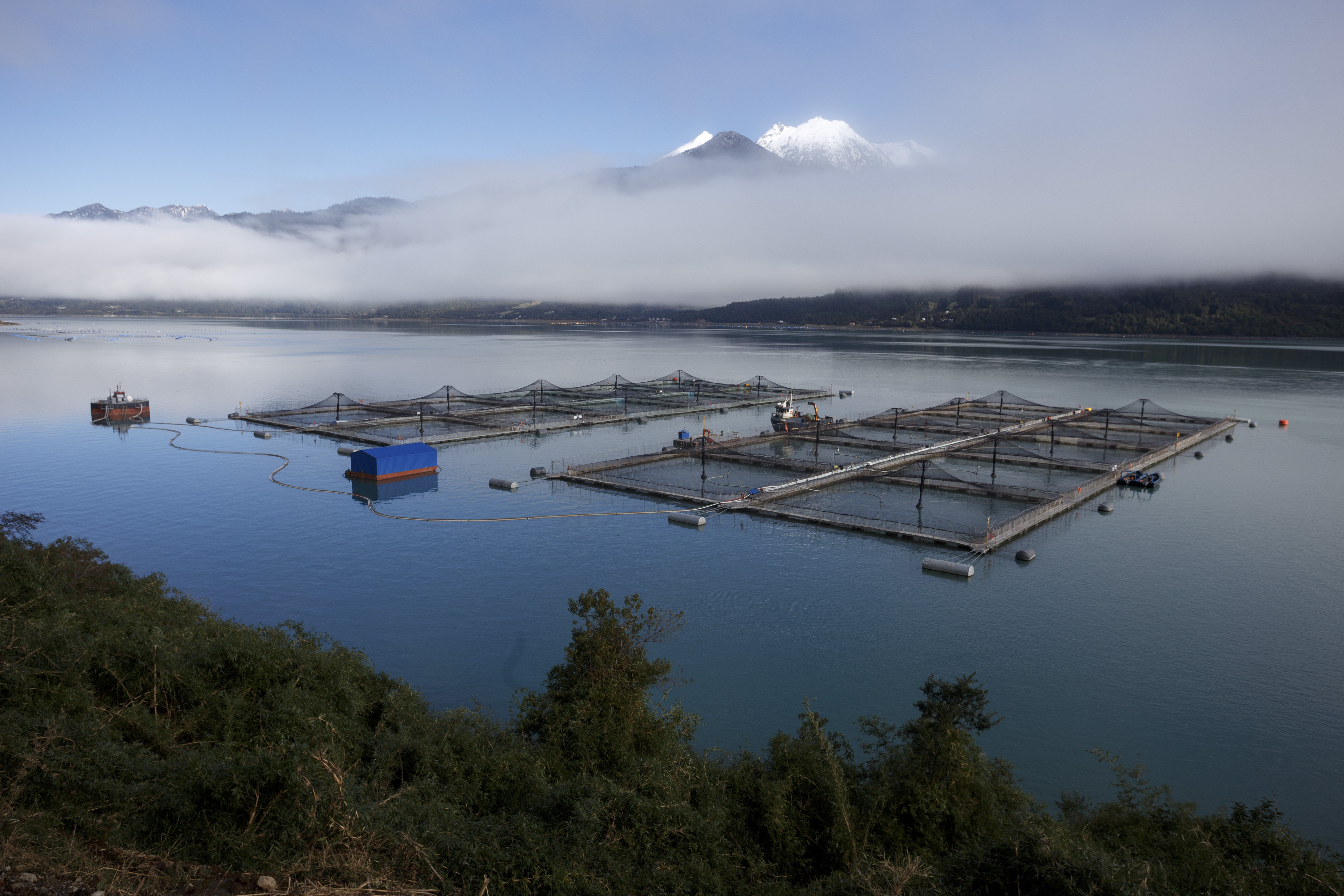 Centro de cultivo de salmón en estuario de Reloncaví, comuna de Cochamó, Región de Los Lagos, Chile.